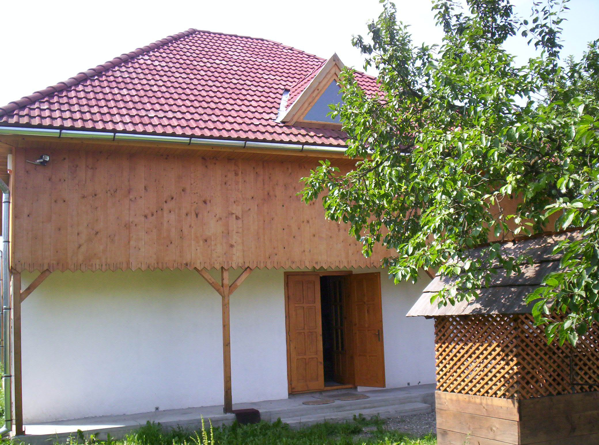 A zabolai Csángó Múzeum épülete – photo taken by uploader User:Csanády in 2006.